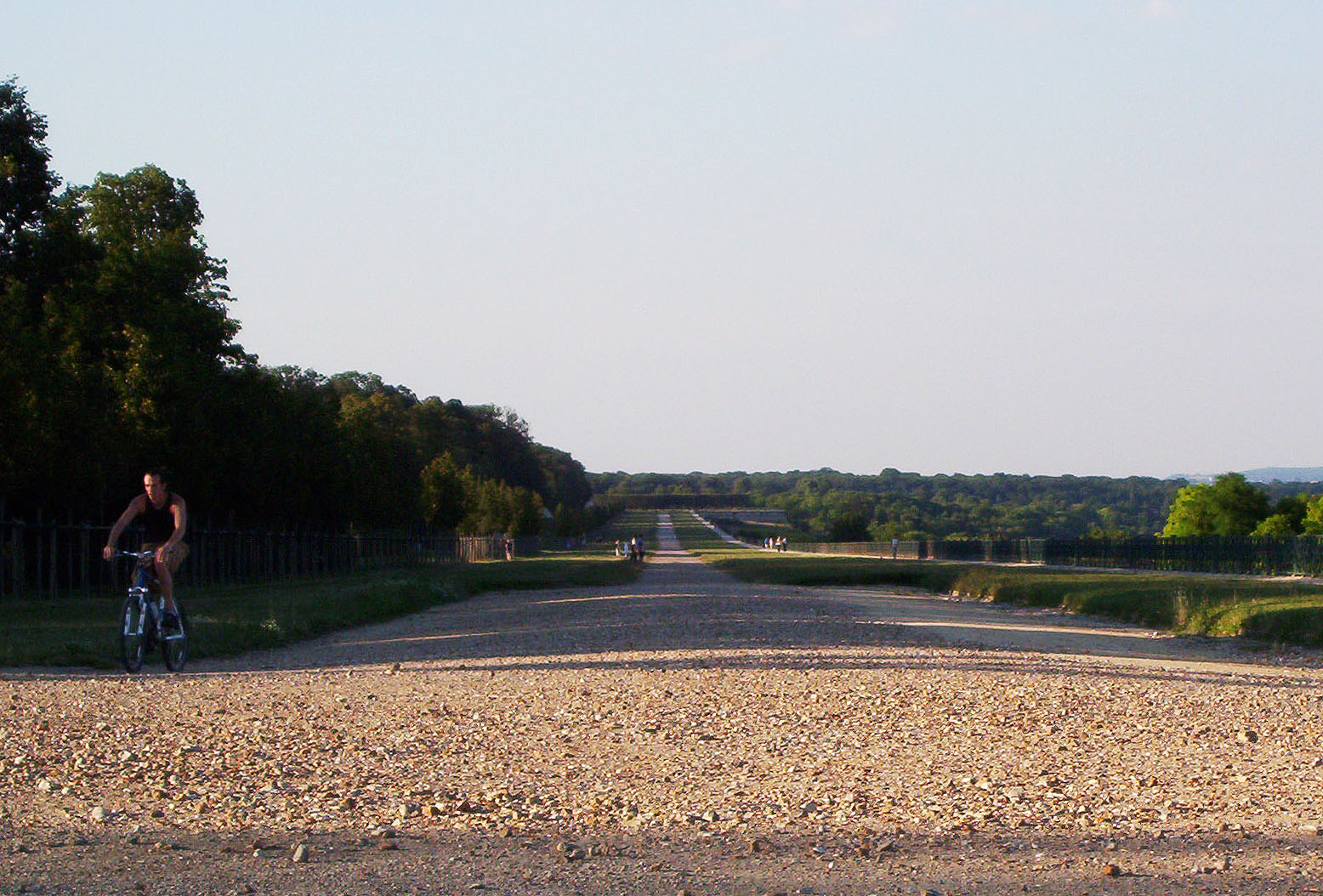 Les terrasses du Château de St Germain en Laye, Yvelines, France.